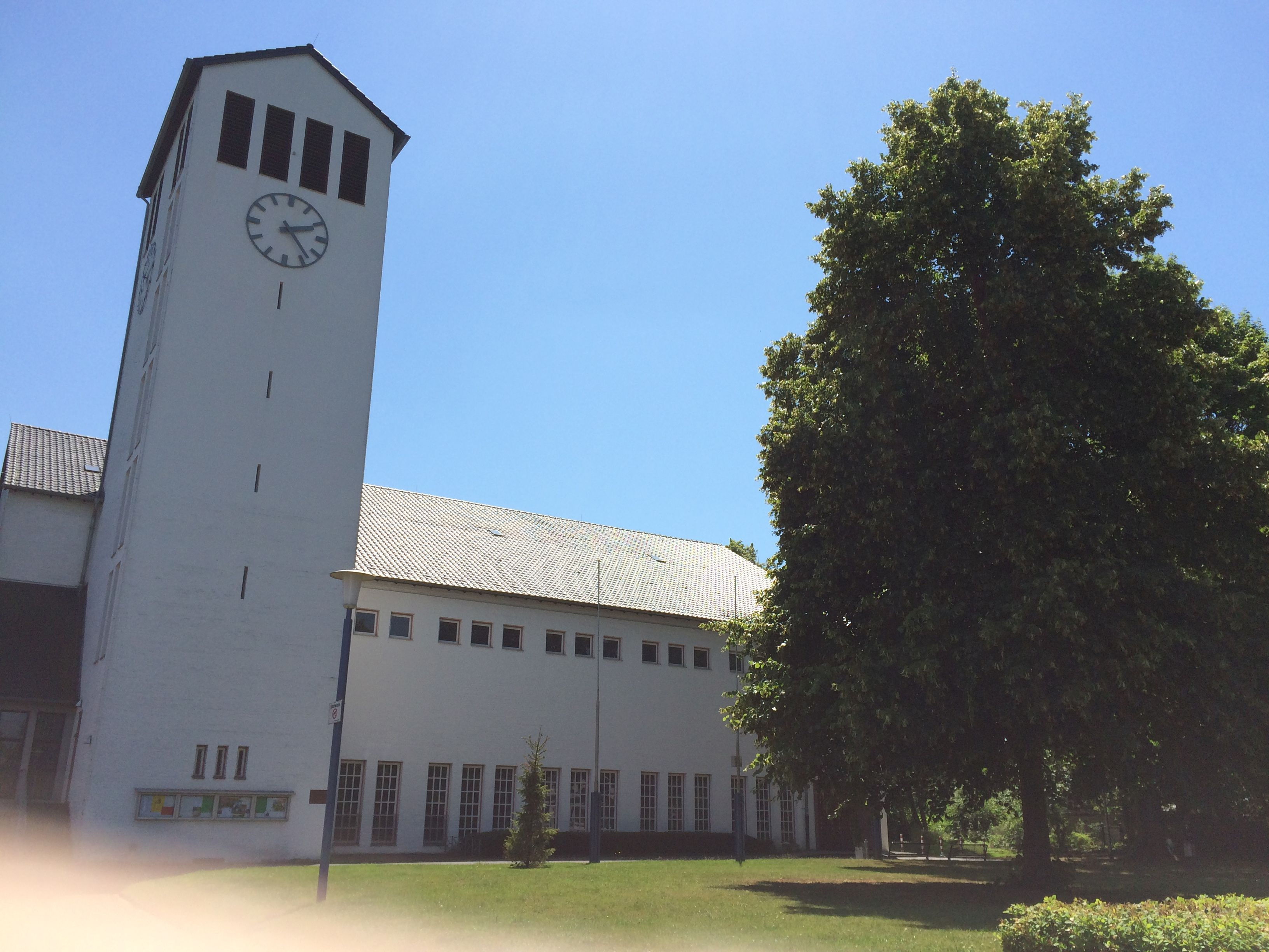 Kirche St. Elisabeth in Neuss-Reuschenberg